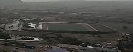 Estadio de fútbol Marcelo Leitão